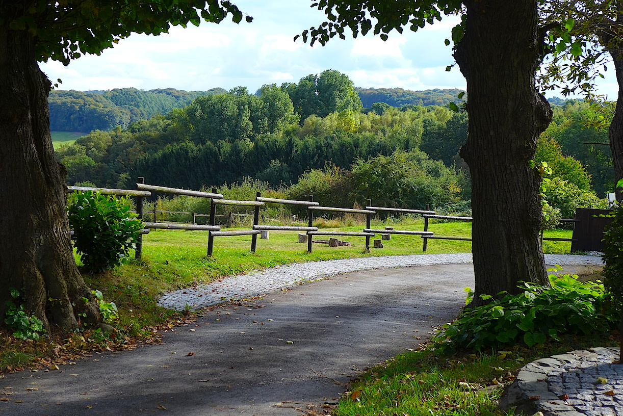 "Тропа Клинка" - туристский маркированнный маршрут вокруг немецкого города Золинген (Северный Рейн-Вестфалия). Шестой этап: вдоль реки Вуппер. 8.0 км.